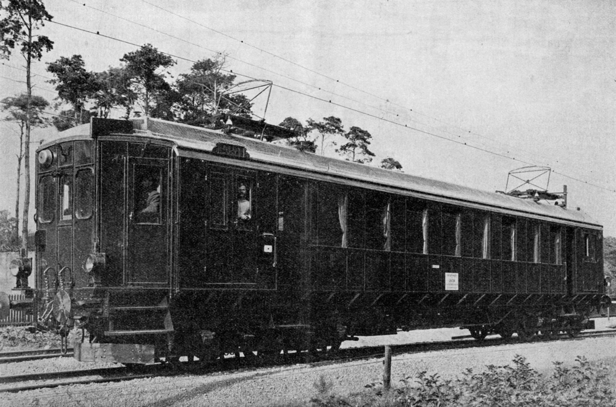 Fahrzeug für die elektrischen Versuchsfahrten auf der Strecke Schöneweide - Spindlersfeld in Berlin